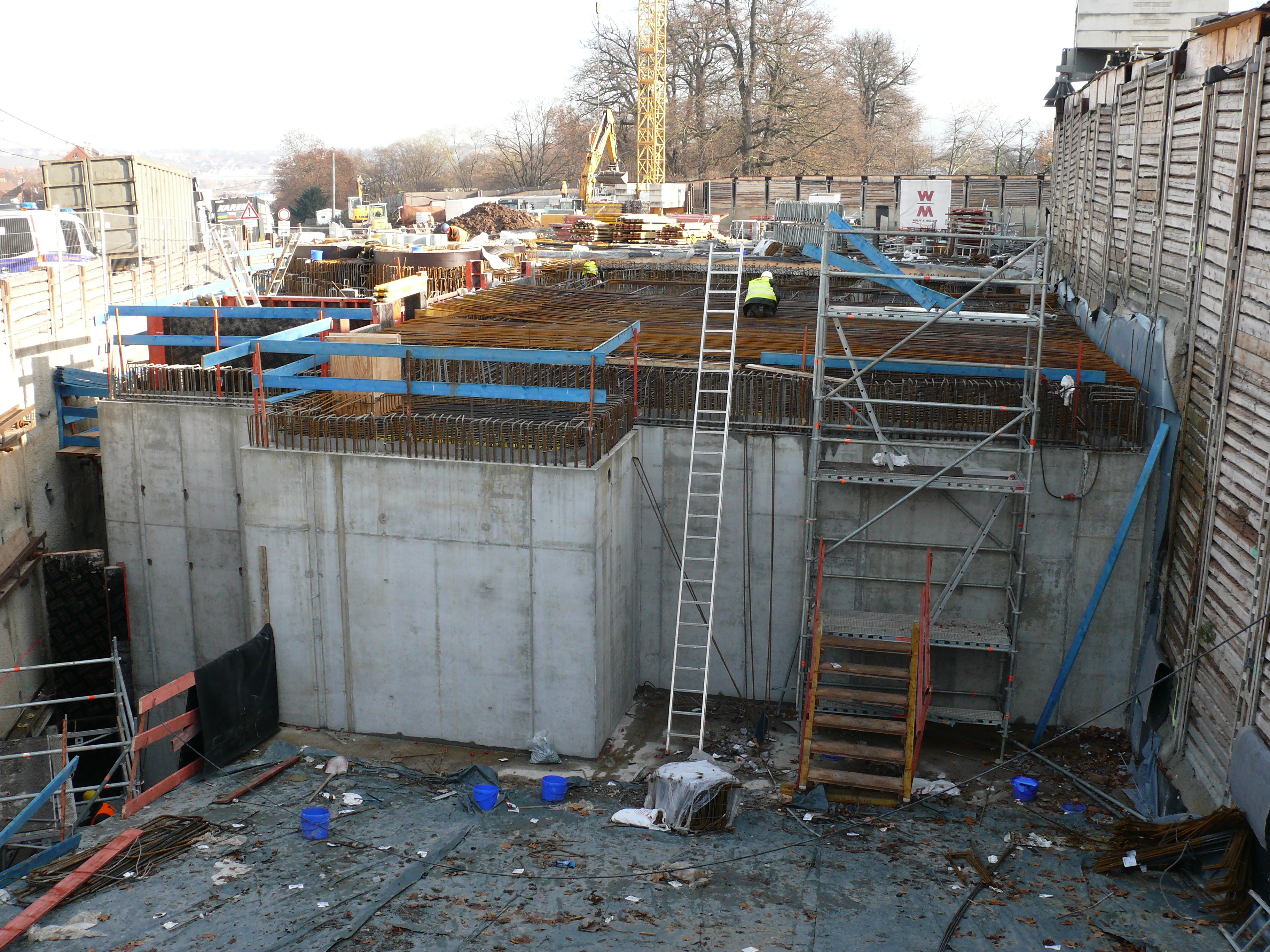 Blick auf das Westportal des Rosensteintunnels (B10) in Stuttgart, im November 2015.